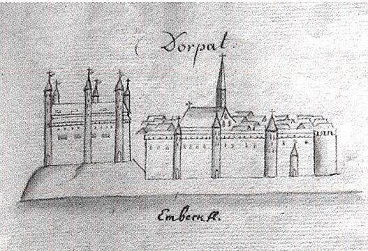 Tartu piiskopiloss (Jaak Juske raamatust 'Lood unustatud Tartust').